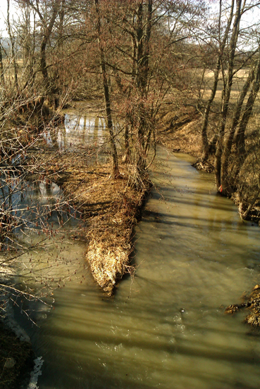 991 03 Pôtor, Slovakia